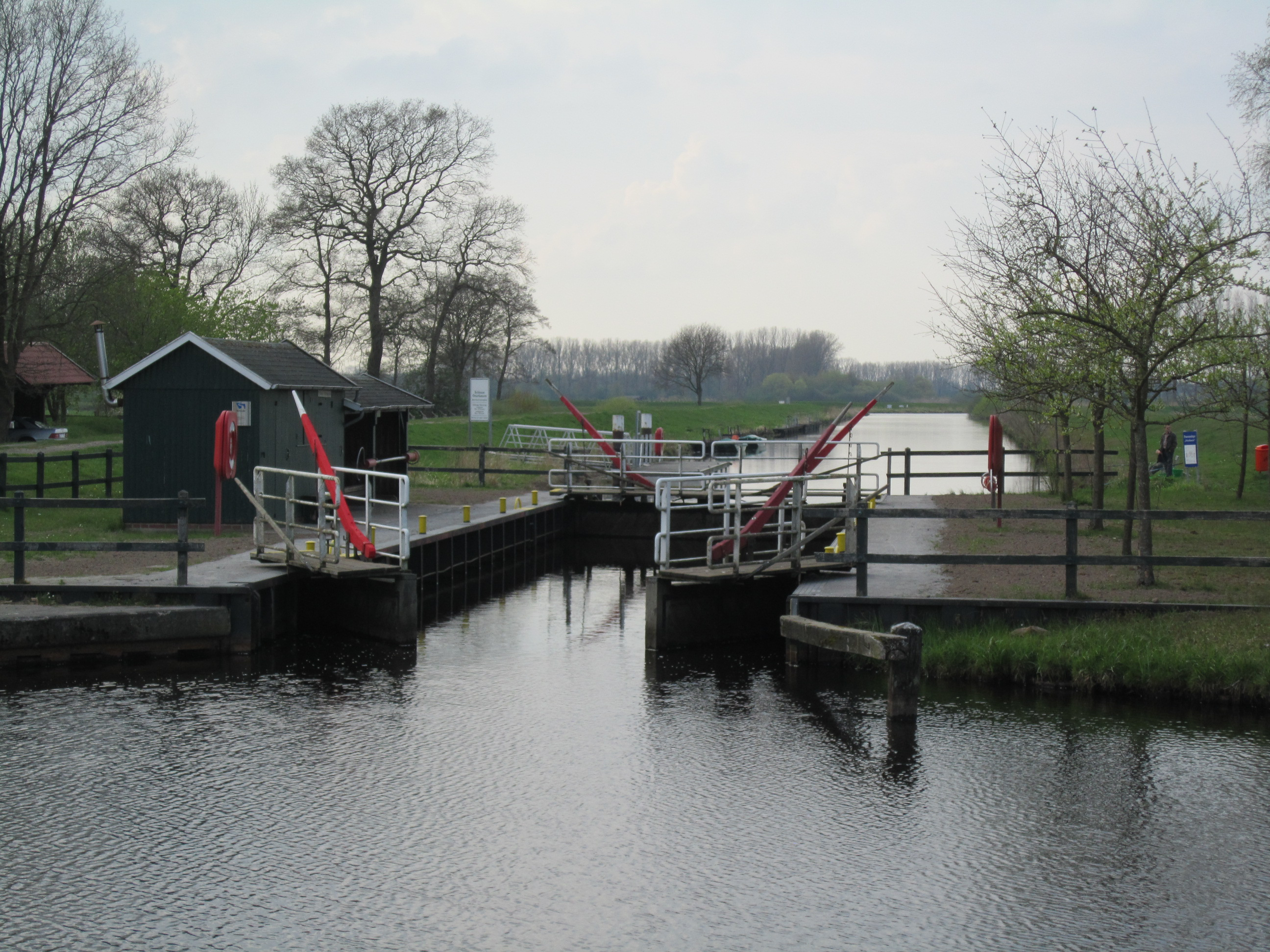 Schleuse Osterhausen im Elisabethfehnkanal